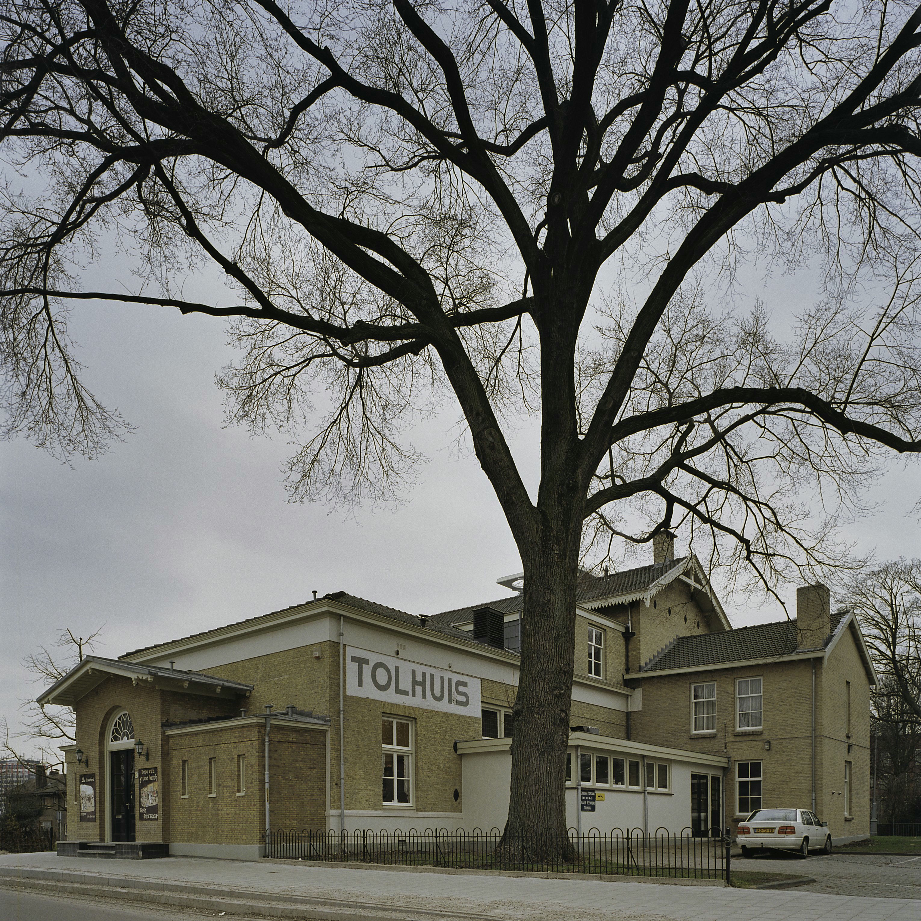 Het Tolhuis: Overzicht restaurant, voorgevel met ingangsportaal en rechter zijgevel, gezien vanaf de weg (opmerking: Gefotografeerd voor Monumenten In Nederland Noord-Holland)